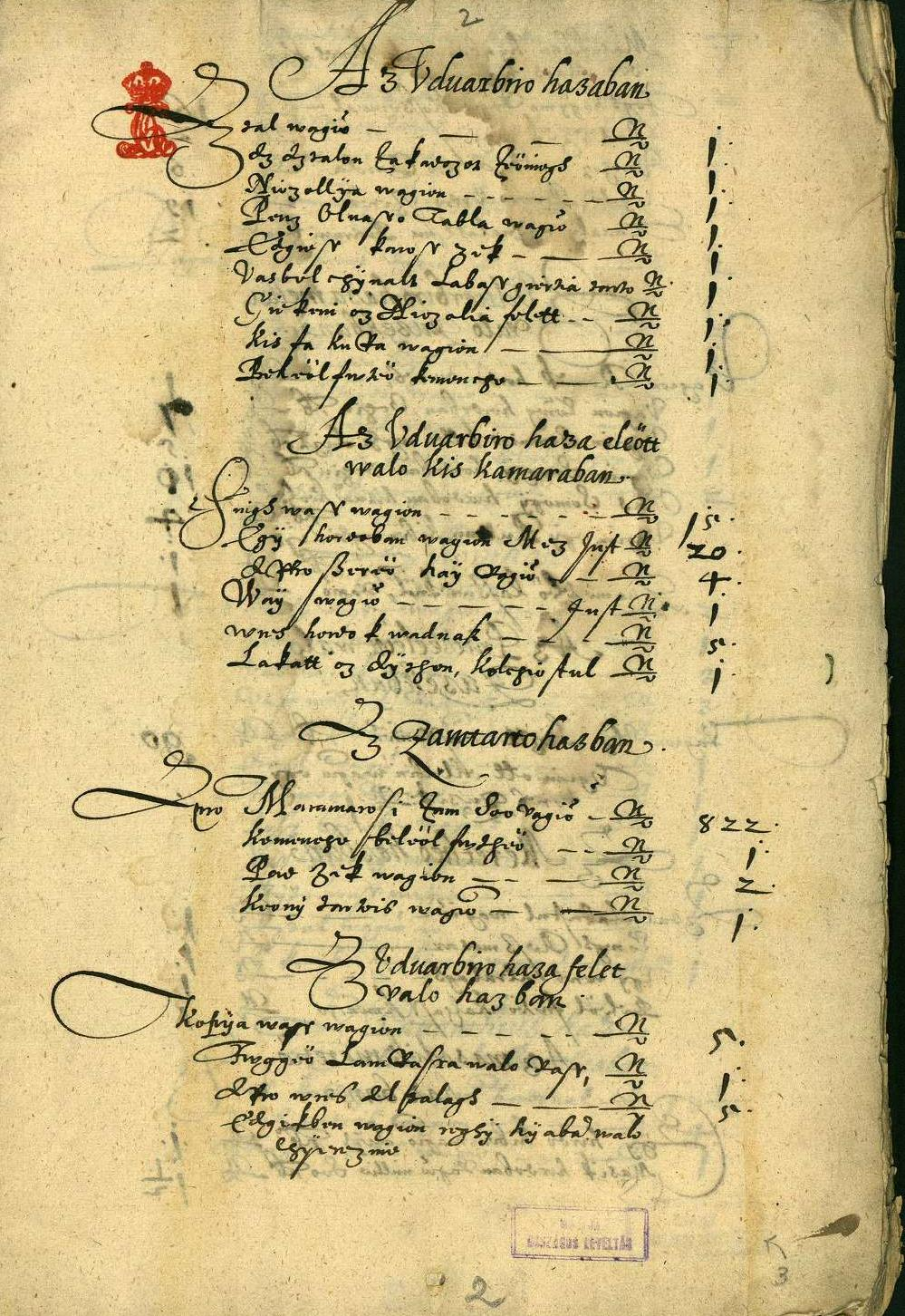 Inventarium egy lapja, amely Span György ecsedi provisor számára készült a vár átvételekor, A szövege magyar nyelvű, az akkori helyesírás szerint. Az udvarbíró házában: Asztal vagion 1. Az asztalon szakadozott zeöniegh 1. Niozollya vagion 1. Pénz olvasó tábla vagion 1. Vagion karosszék 1. Vasból chynalt labas giertia tartó 1 Giekeni az niozolia felett 1 Kis fa kupa vagion1. Beleul fwteő kemencze 1. Az udvarbíró háza eleött való kis kamrában: Singh vas vagion 15. Egy hordóban vagion méz iusta 20. Aproszereő hay vagion 4. Way vagion iusta 1. Wres hordók wadnak 3. Lakatt az aytho kolehiostul 1. A számtartó házban: Apró Máramarosi soo vagion 822. Kemence beleől Fwtheő 1. Pad zék vagyion 2. Keon[v]tartó i vagion 1. Az udvarbíró háza felet[t]való házban: Kopya vagion 5. Fwggeö lámpásra való vas 1. Apró wres altalagh 5.